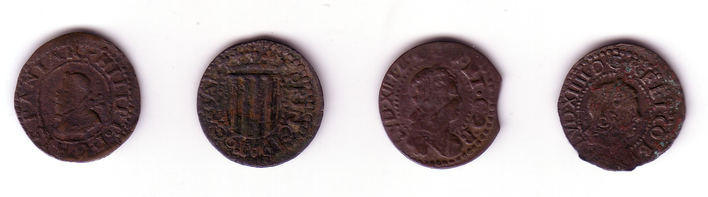 Sisens (moneda catalana) anvers. Un sisè és una moneda catalana de coure encunyada durant la Guerra dels Segadors a diferents localitats de Catalunya, com Tàrrega, Girona, Solsona, Barcelona, Manresa, Sanaüja, Valls, Vic o Vilafranca del Penedès.